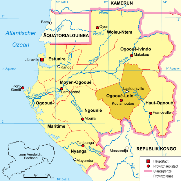 politische Karte Gabuns (Provinz Ogooué-Lolo hervorgehoben)